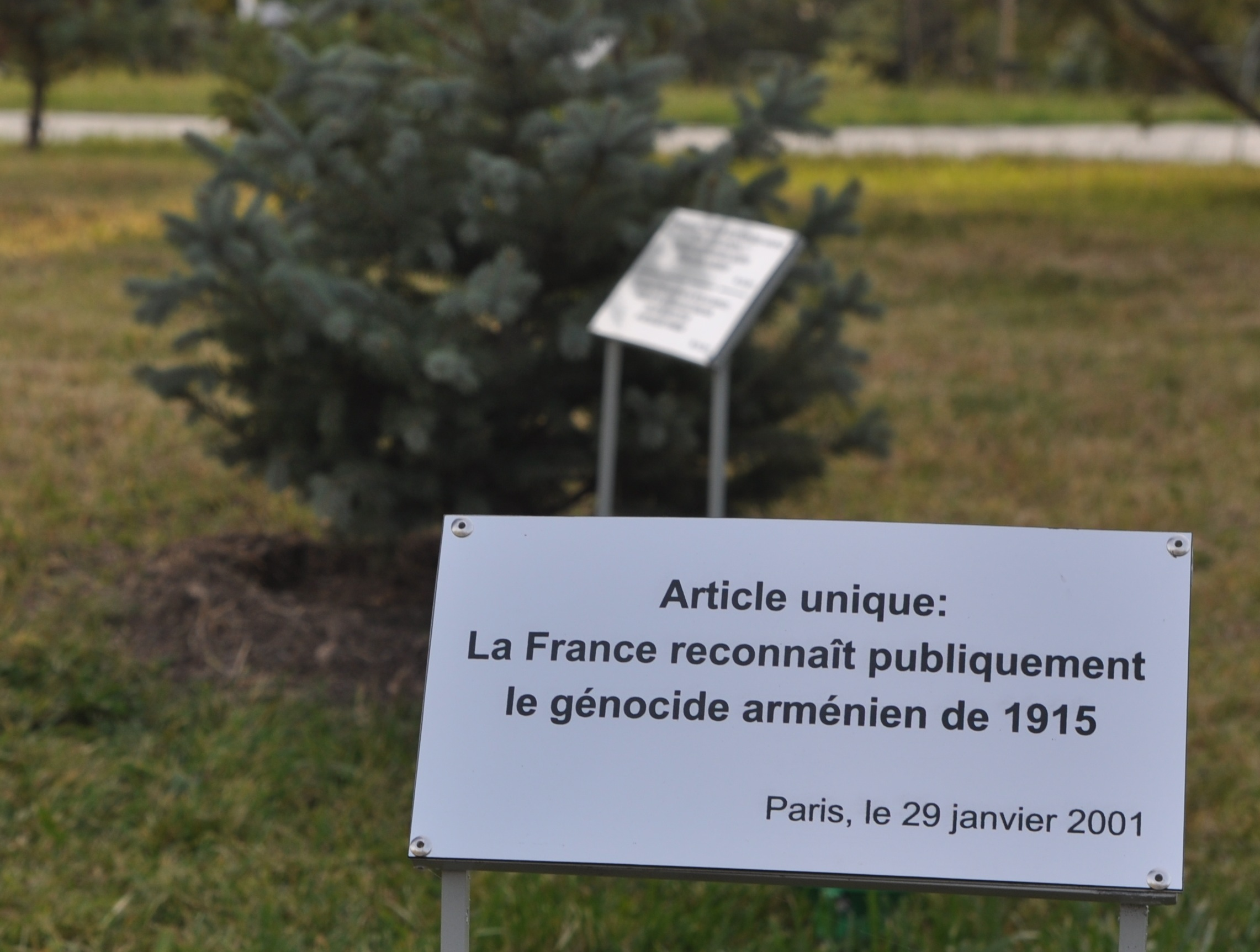 Plaque de la reconnaissance du génocide Arménien à Yerevan